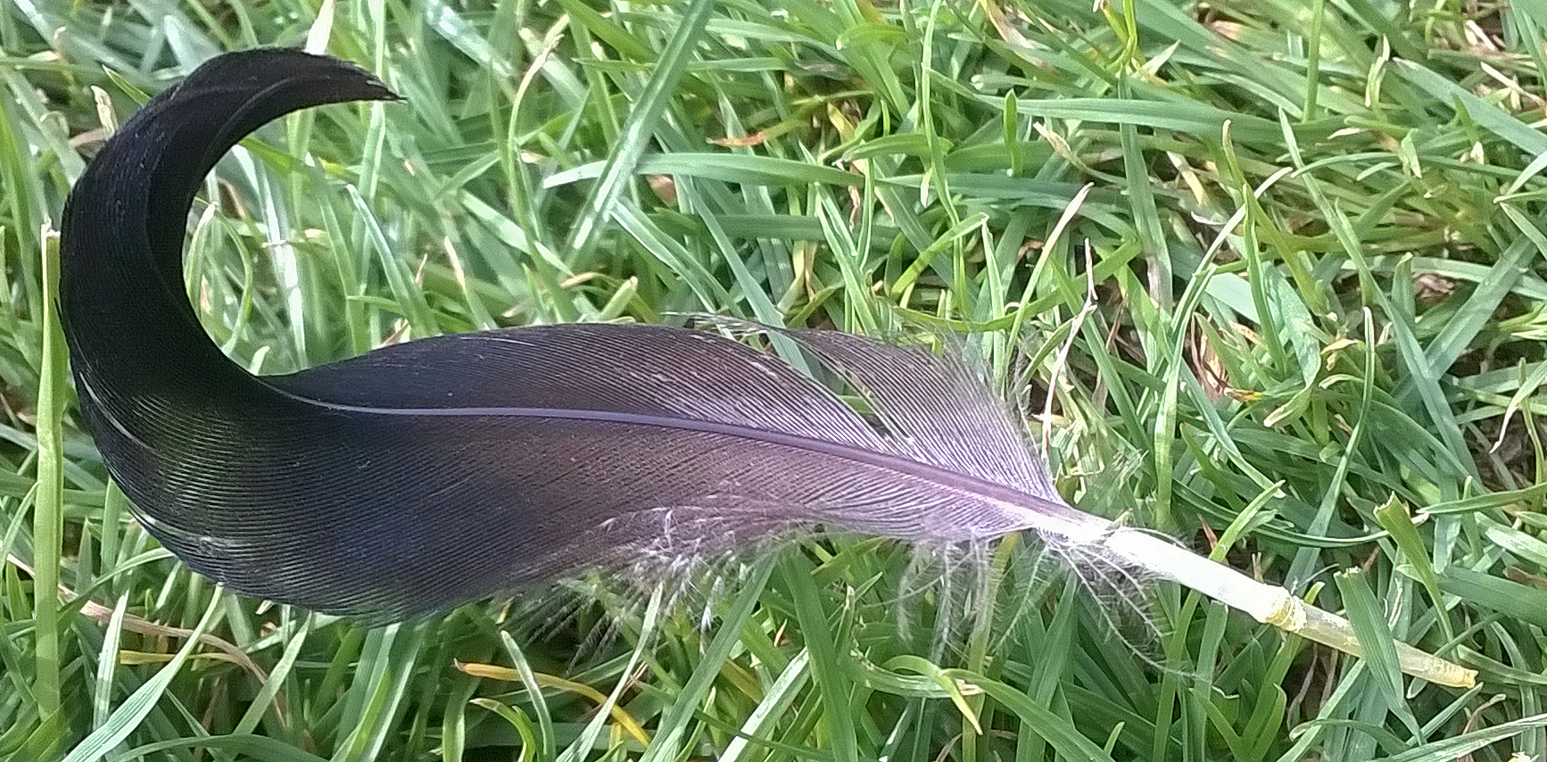 Eine gemauserte Steuerfeder einer männlichen Stockente (Anas platyrhynchos), eine "Erpellocke".